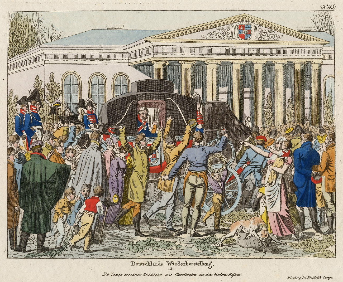 Wilhelm I. von Hessen-Kassel. Kutsche. Kassel. Jahr 1813.